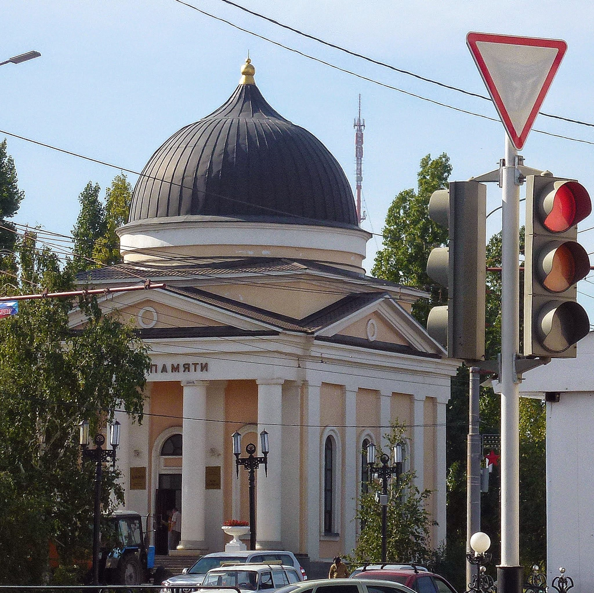 Дом памяти, Оренбург